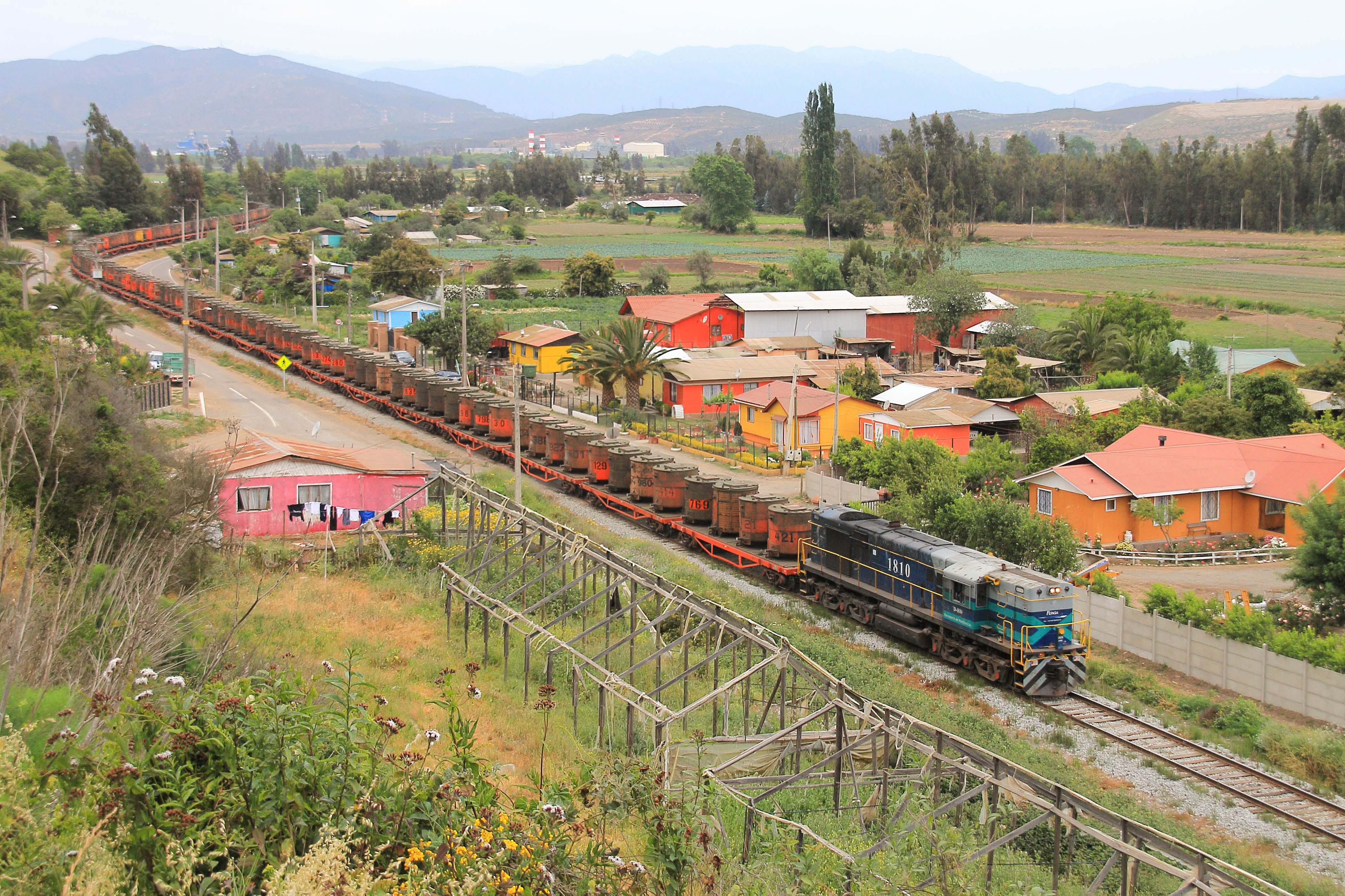 La tranquilidad de este pequeño caserío en la ribera norte del Rio Aconcagua, se ve quebrantada por la pasada de esta gran serpiente metálica, cargada con concentrado de cobre rumbo al puerto de Ventanas. D-1810 a su paso por Carolmo Ramal San Pedro - Ventanas Chile. Noviembre 2014